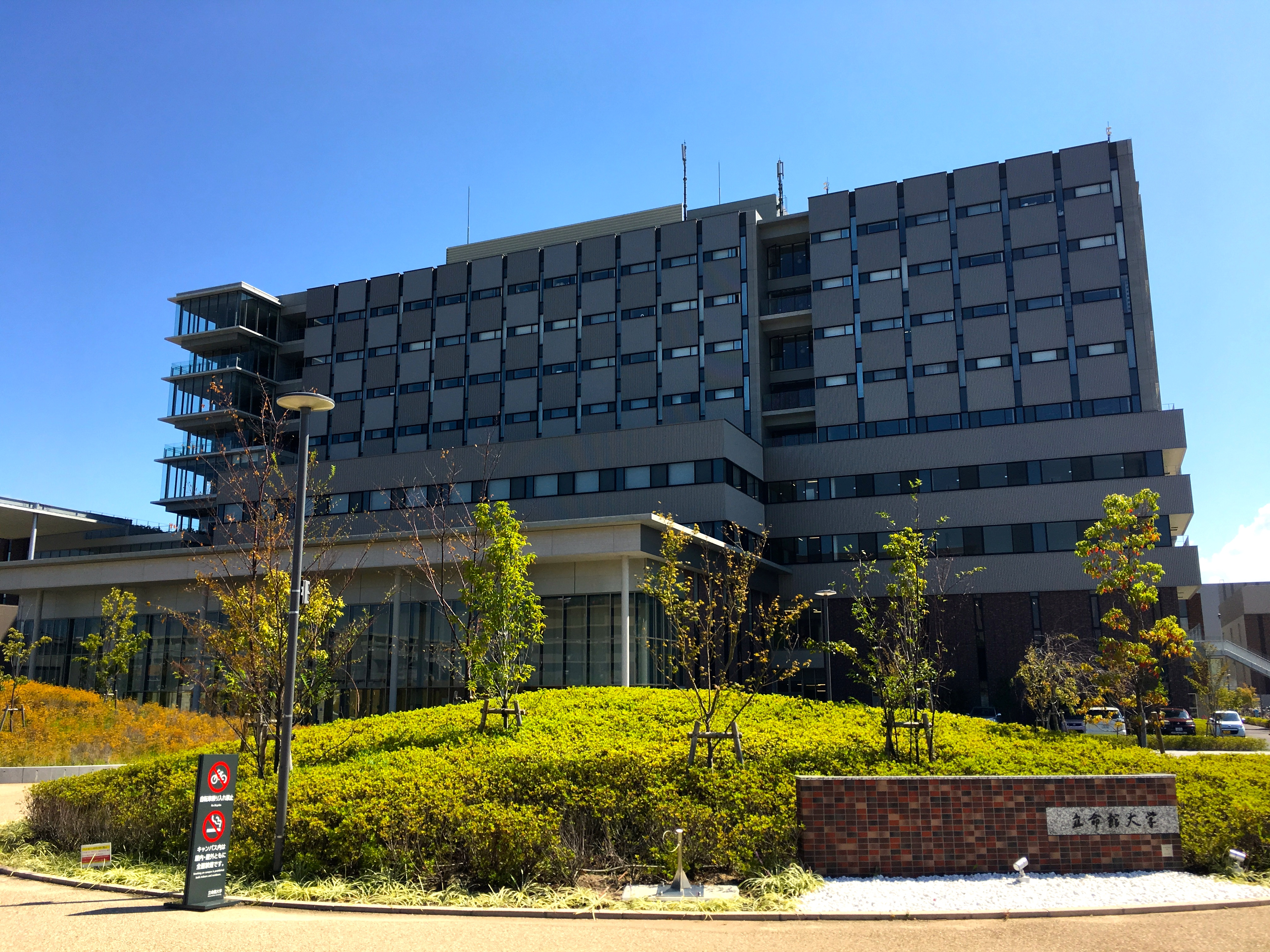 Ritsumeikan University Osaka Ibaraki Campus